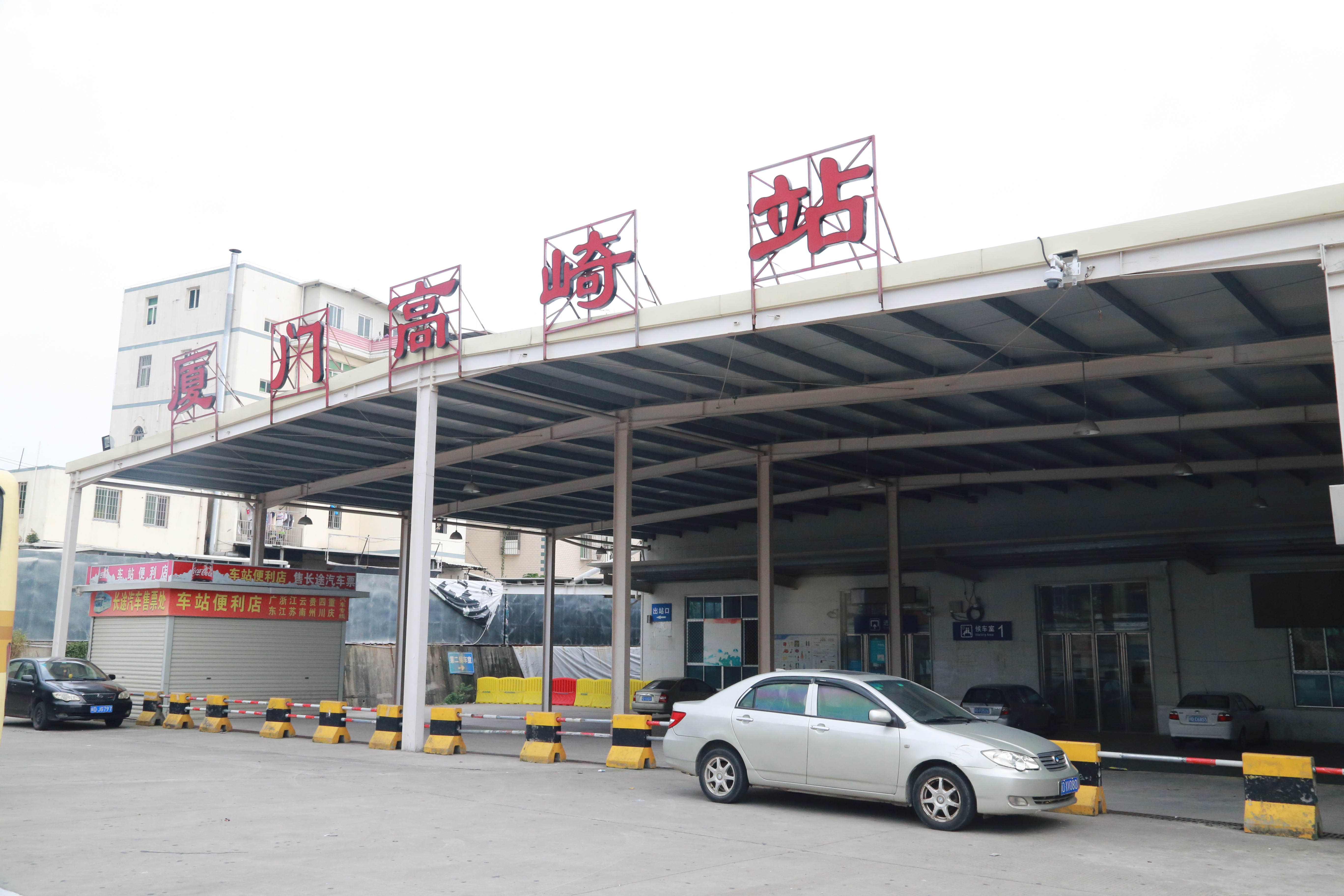 新增雨棚的高崎站